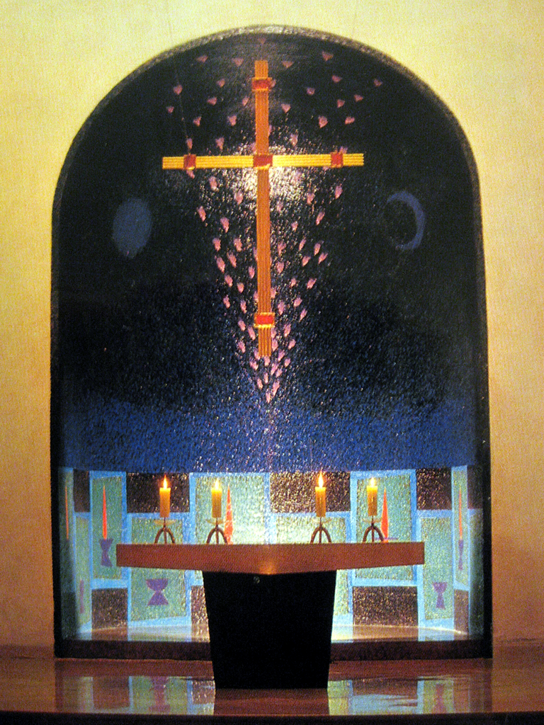 Concha (Smaltenmosaik) und Altarkreuz (Messing, Glasstein), Schafbergkirche, Wien, 1962